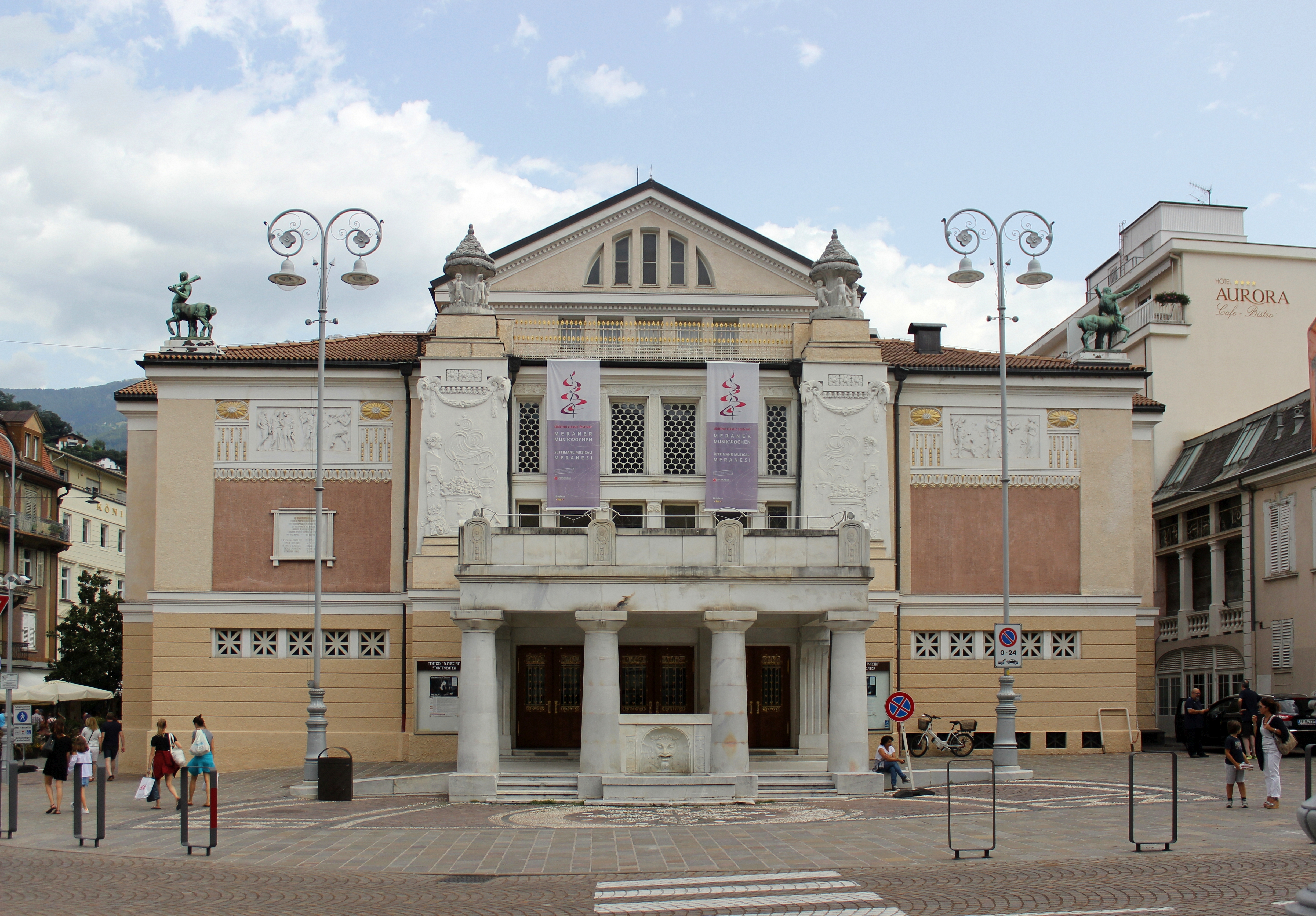 Stadttheater Meran 2017